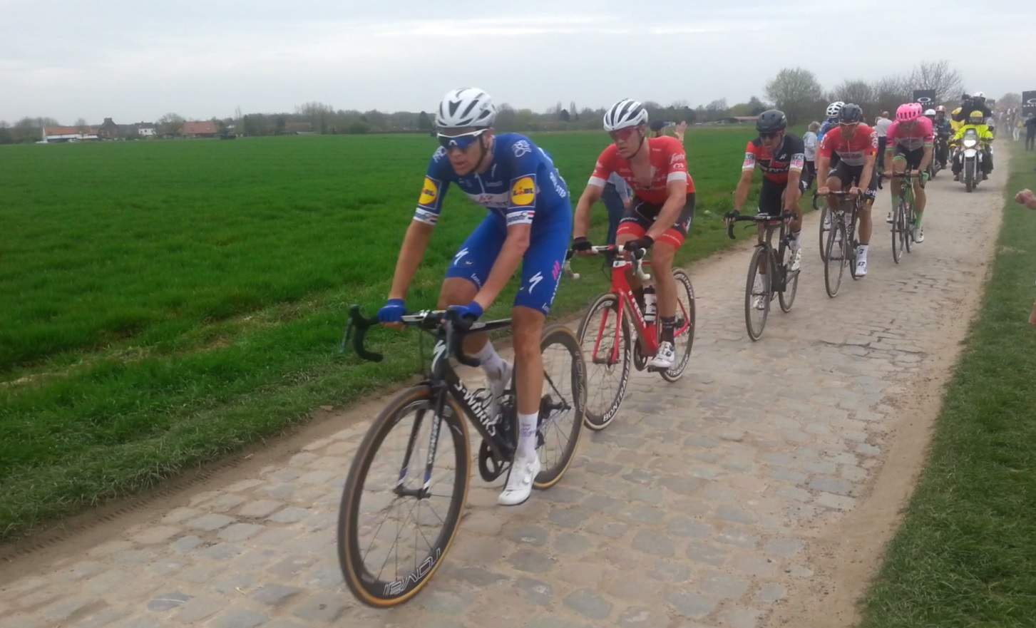 Niki Terpstra en tête du groupe de contre-attaque - Paris-Roubaix 2018 - secteur de Cysoing à Bourghelles